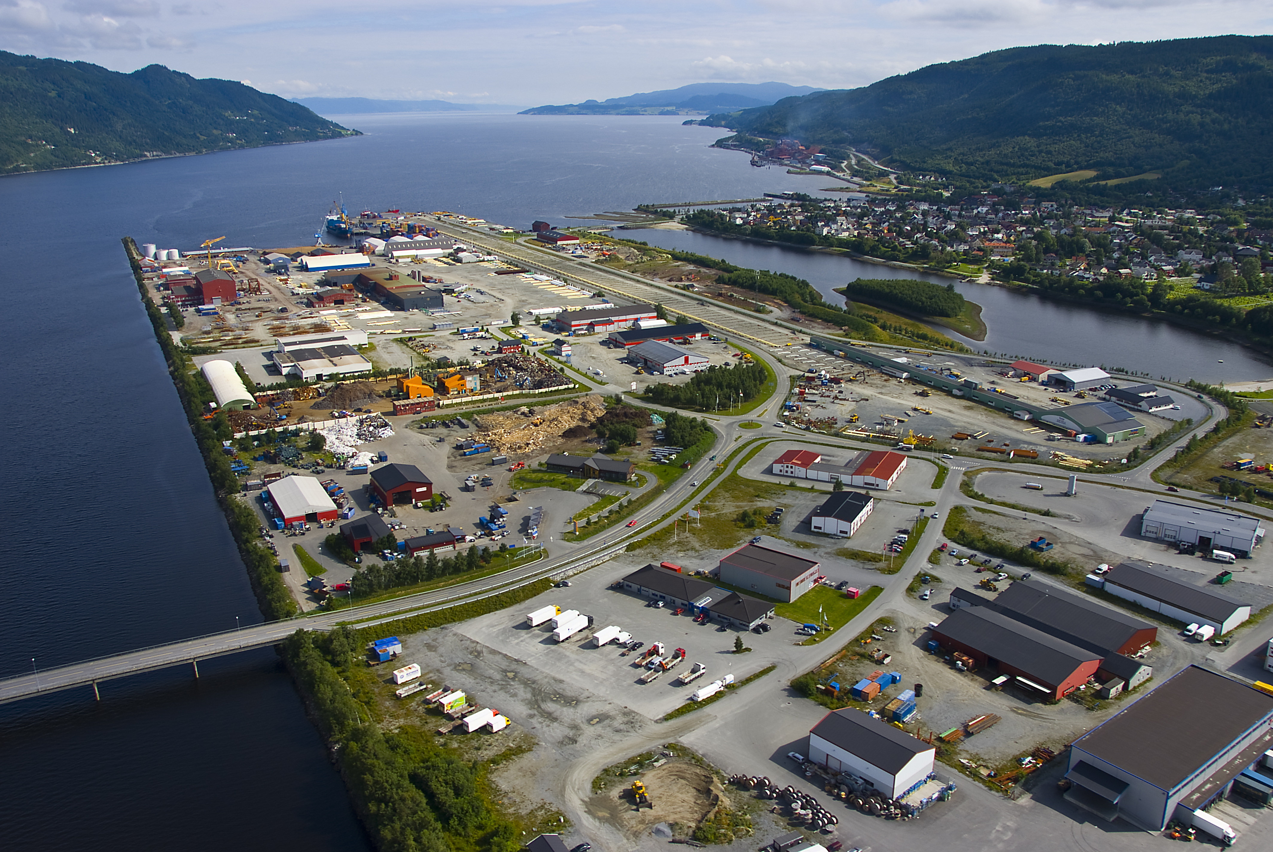 Industriområdet Grønøra på Orkanger. Lengst ute ved fjorden skimtes Orkanger havn, til venstre Orklas utløp i Orkdalsfjorden. Foto: Trondheim Havn/Åge Hojem